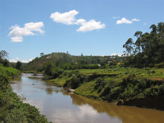 Mananara_rivière_du_martyr_Jacques_Berthieu